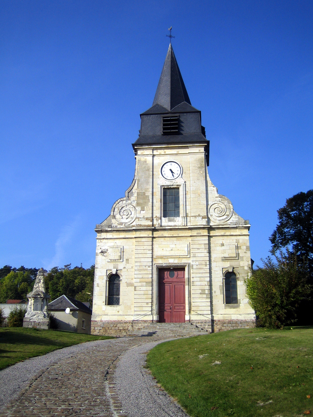 Heilly (Somme, France) - L'église.